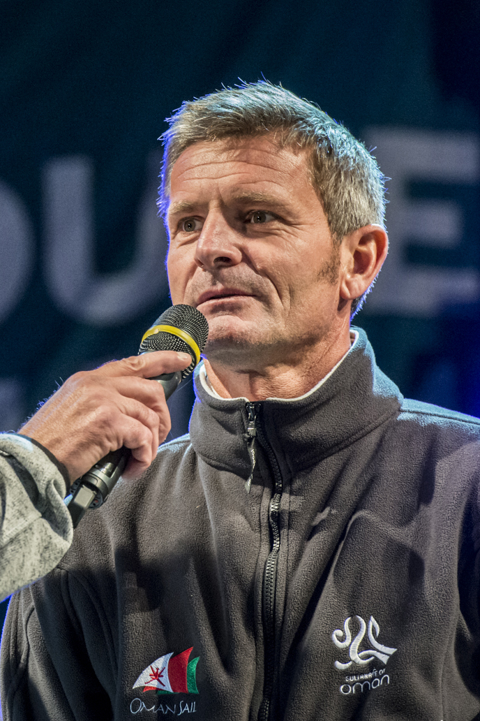 Le skipper français Sidney Gavignet, au départ de la Route du Rhum 2014